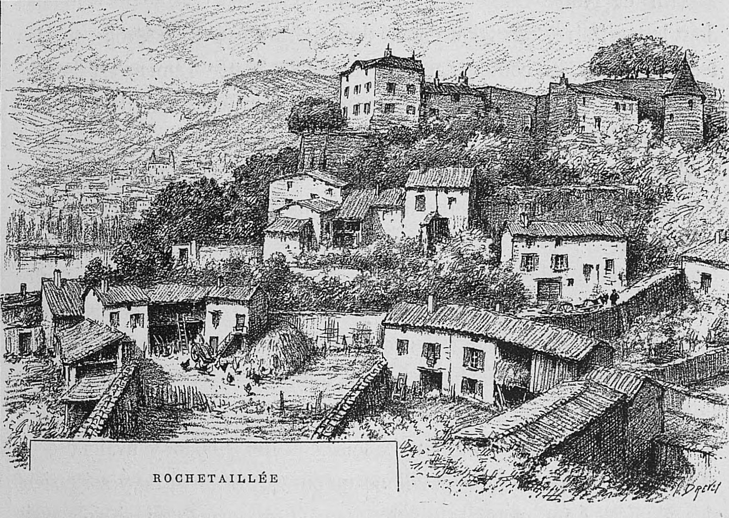 Aux environs de Lyon / Monsieur Josse ; préface de M. Coste-Labaume ; édition illustrée de 250 dessins de J. Drevet.